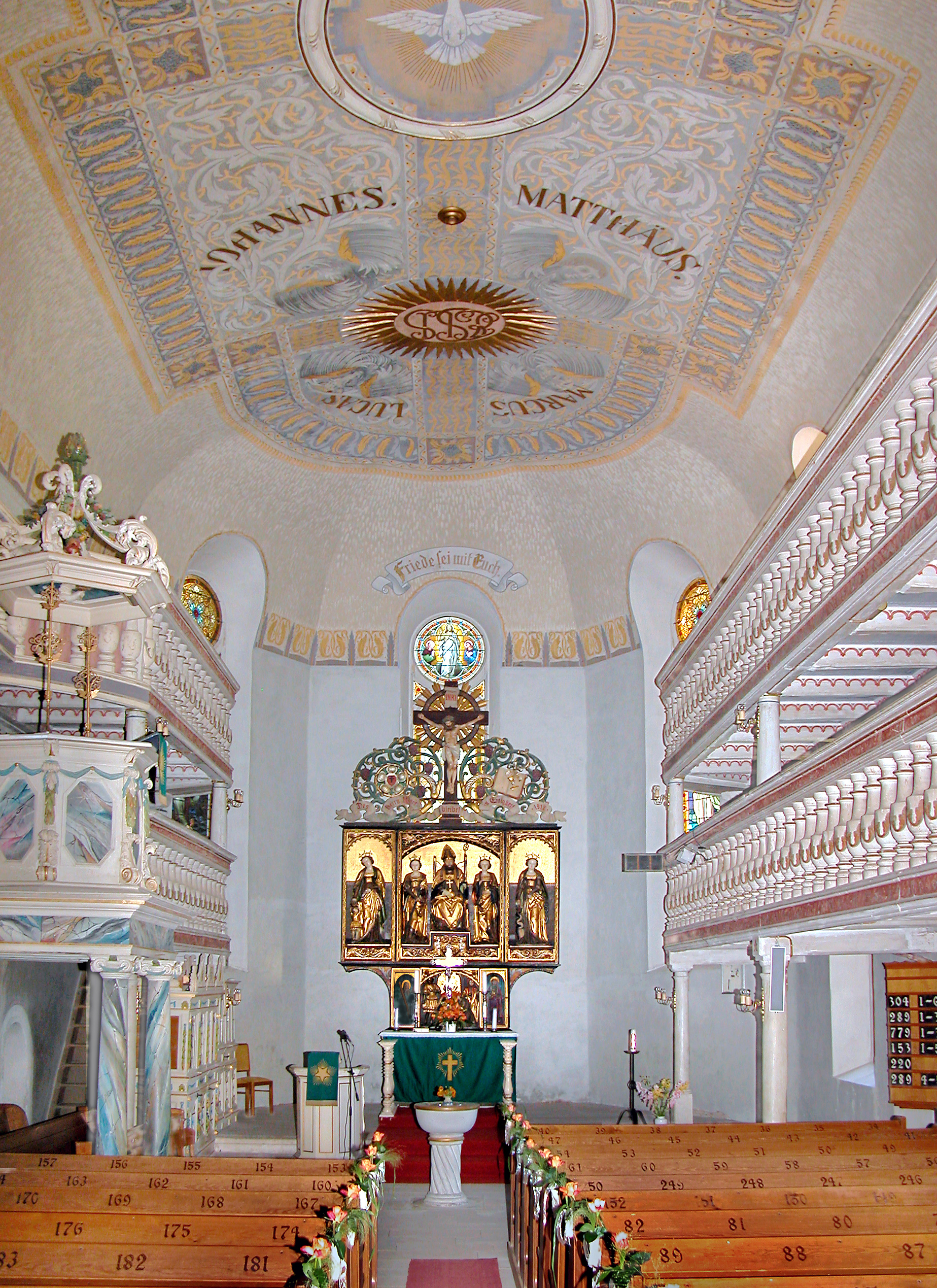 12.09.2011 09627 Oberbobritzsch (Bobritzsch-Hilbersdorf), Kirchstraße (GMP: 50.875369,13.453209): Dorfkirche St. Nicolaus. Sicht von SW. Erstmals 1392 erwähnt. Im Kern mittelalterlich, 1710 erneuert. Sechsflügeliger Schnitzaltar (Nikolausaltar) von 1521 von einen unbekannten Freiberger Künstler. [DSCNn2741&49.TIF]201109122310MDR.JPG(c)Blobelt